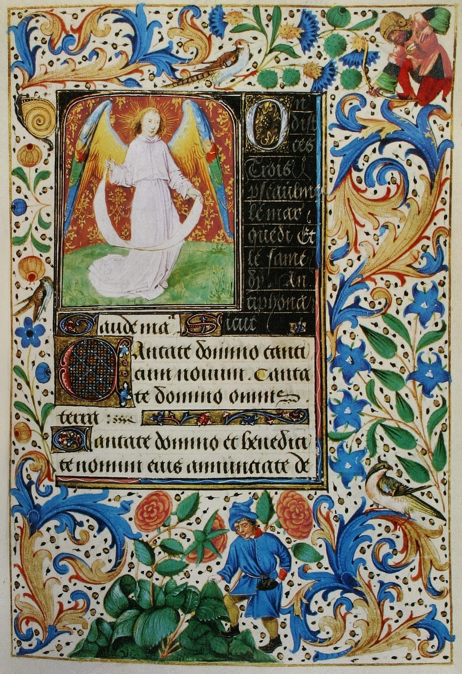 Wien, Österreichische Nationalbibliothek, cod. 1857, Stundenbuch der Maria von Burgund. In: Franz Unterkirchner (Hrsg.): Das Stundenbuch der Maria von Burgund. Codex Vindobonensis 1857 der Österreichischen Nationalbibliothek (Glanzlichter der Buchkunst), Darmstadt 1993.